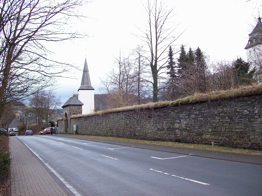 Kloster Grafschaft bei Schmallenberg (Germany)